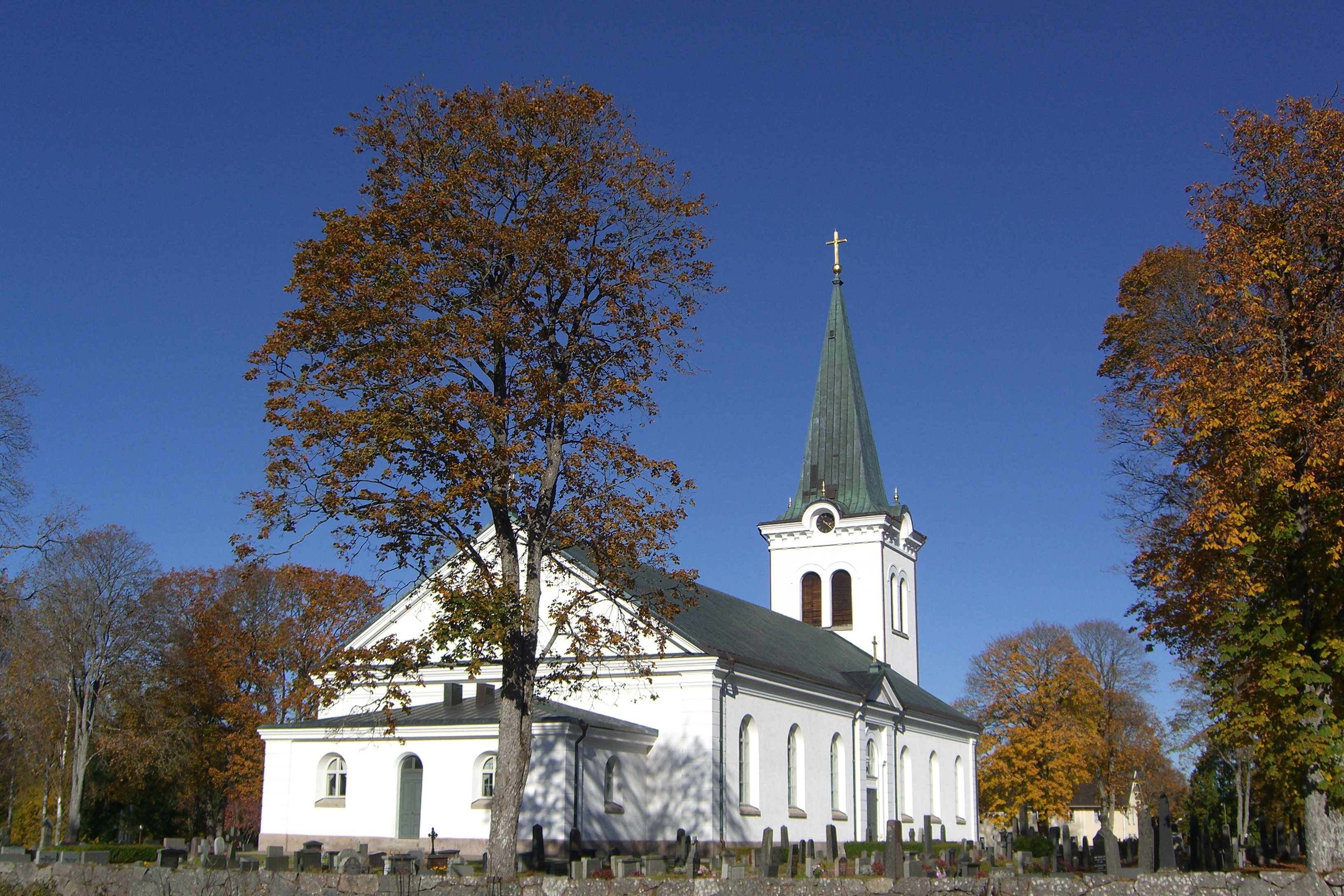 Standort Rävemåla, Gemeinde Älmeboda (Tingsryds Kommun)